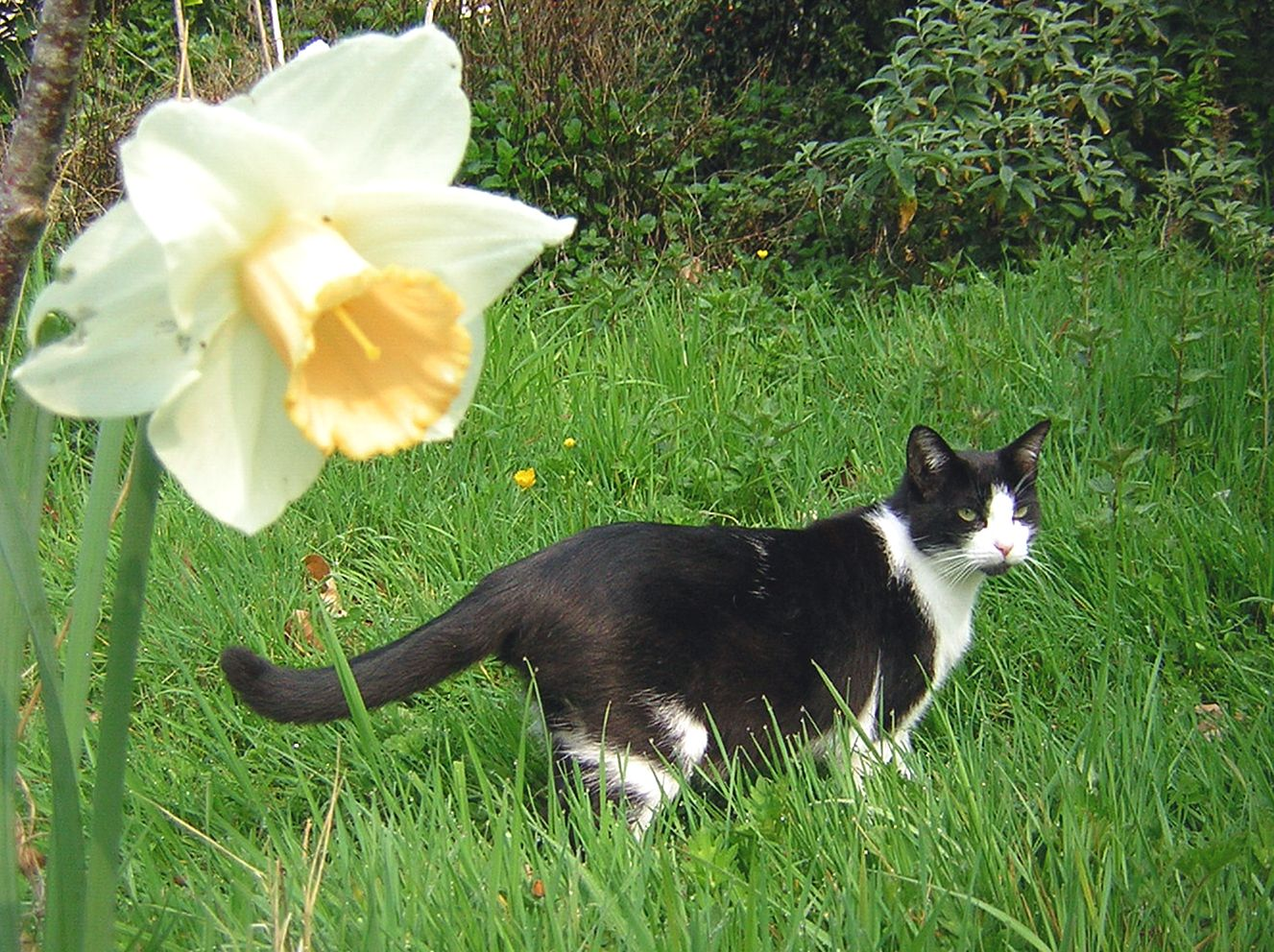 Leafy